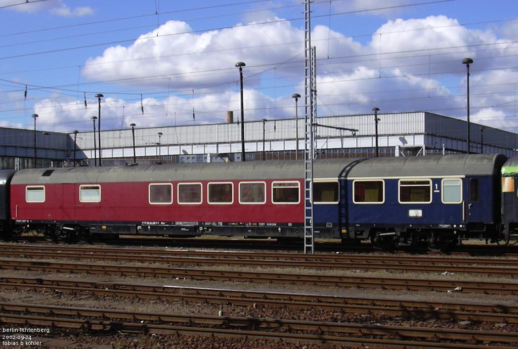 Halbspeisewagen ARmh 211 Kakadu ehemals Deutsche Bundesbahn (DB), in purpurroter und kobaltblauer Lackierung, in Berlin-Lichtenberg.